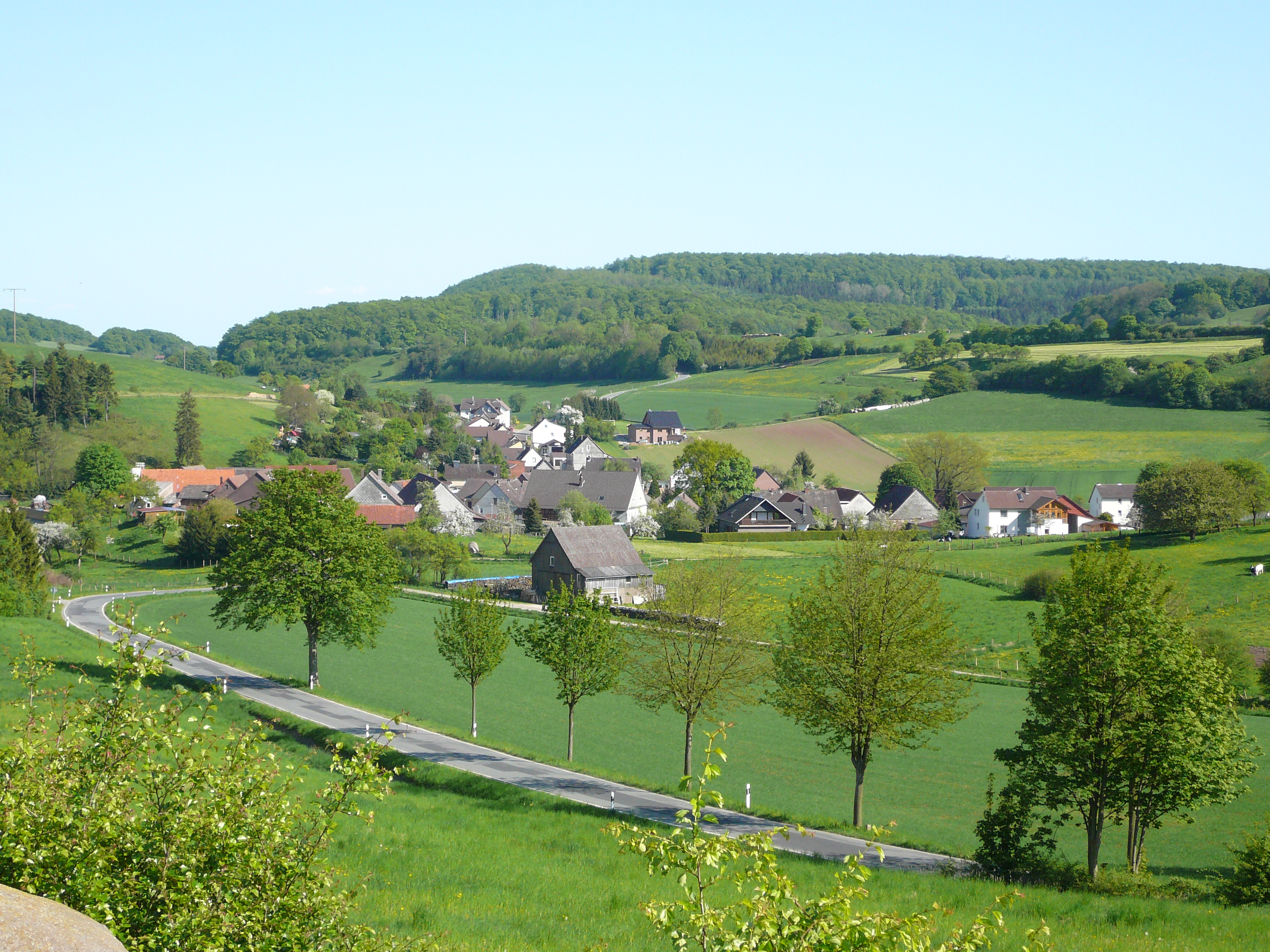 Blick von Nordwesten auf Linnenkamp, Gemeinde Wangelnstedt, Landkreis Holzminden